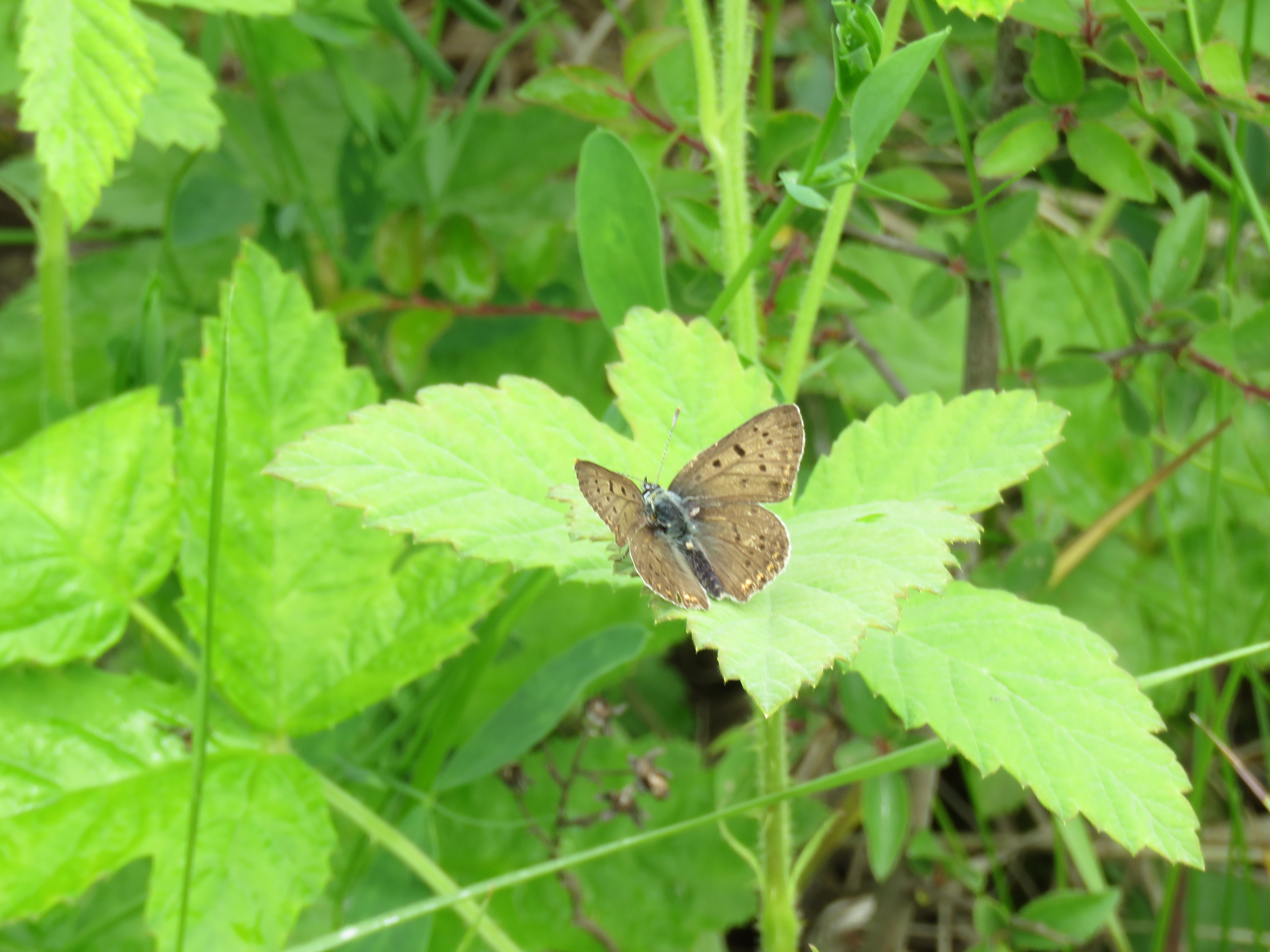 Srpski (latinica): Predstavnici faune dnevnih leptira Srbije